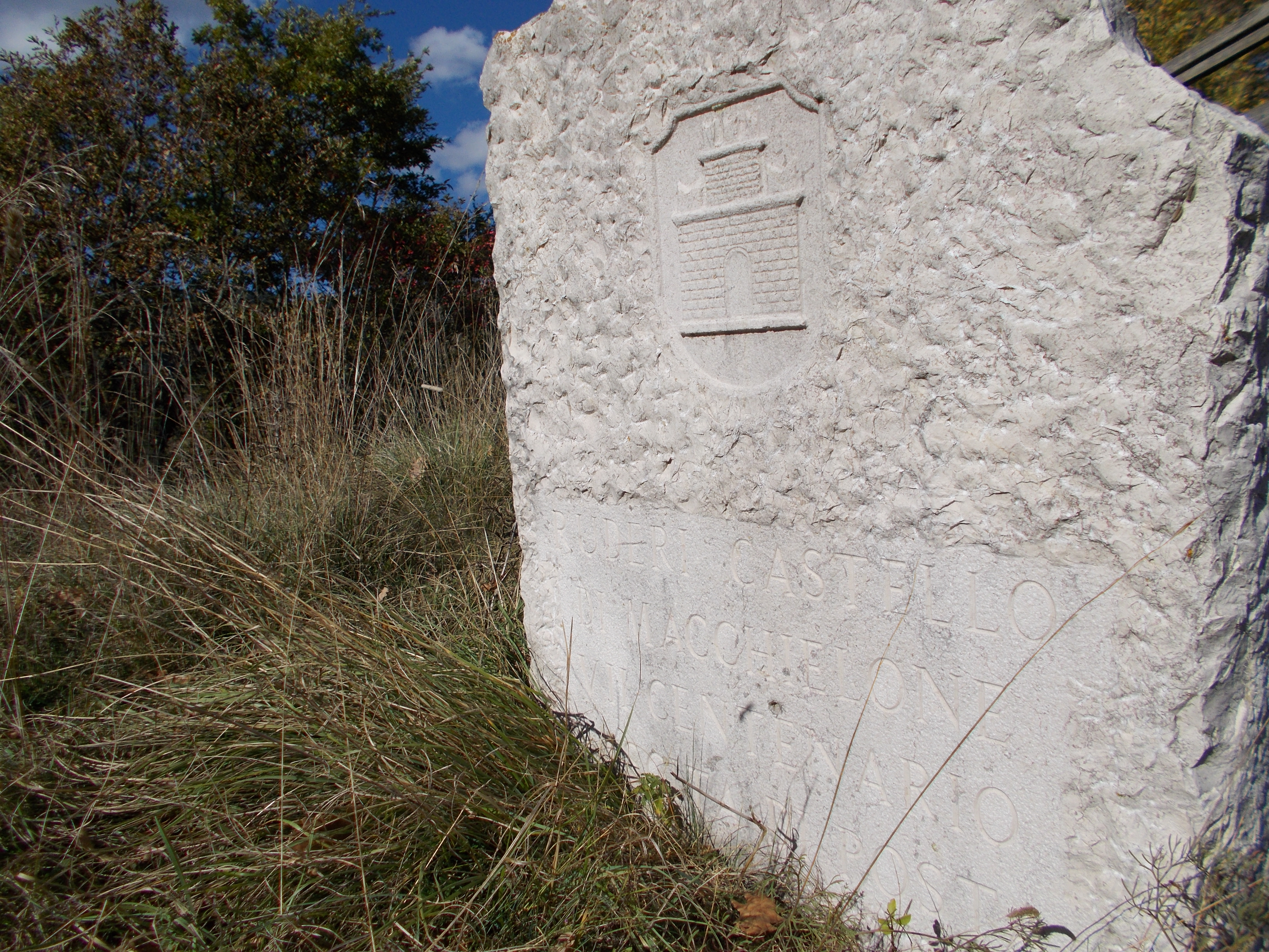 In occasione dei 700 anni dall'ipotetica costruzione del Paese di Posta, è stata fissata questa lapide commemorativa ove sorgeva il Castello Di Machilone.